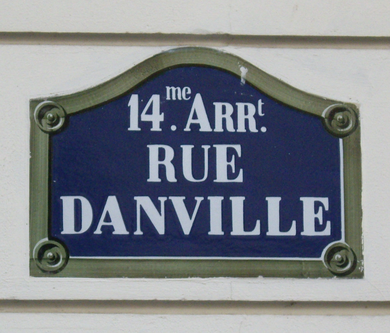 Plaque de la rue Danville, Paris 14e, en mémoire du géographe et cartographe Jean-Baptiste Bourguignon d'Anville (1697-1782).